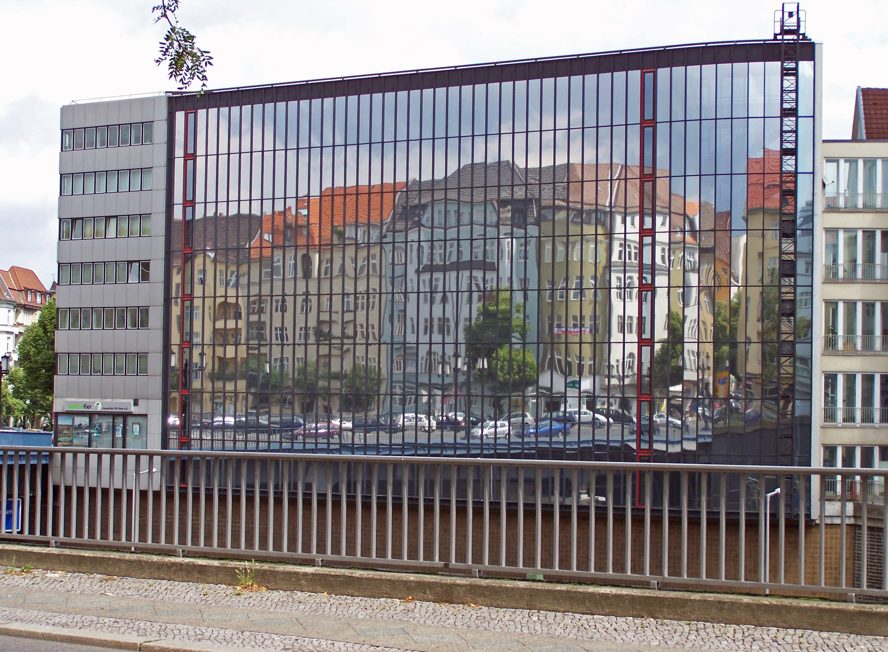 Wohn- und Bürohaus des Berliner Architekten , Am Kaieserdamm in Berlin-Charlottenburg